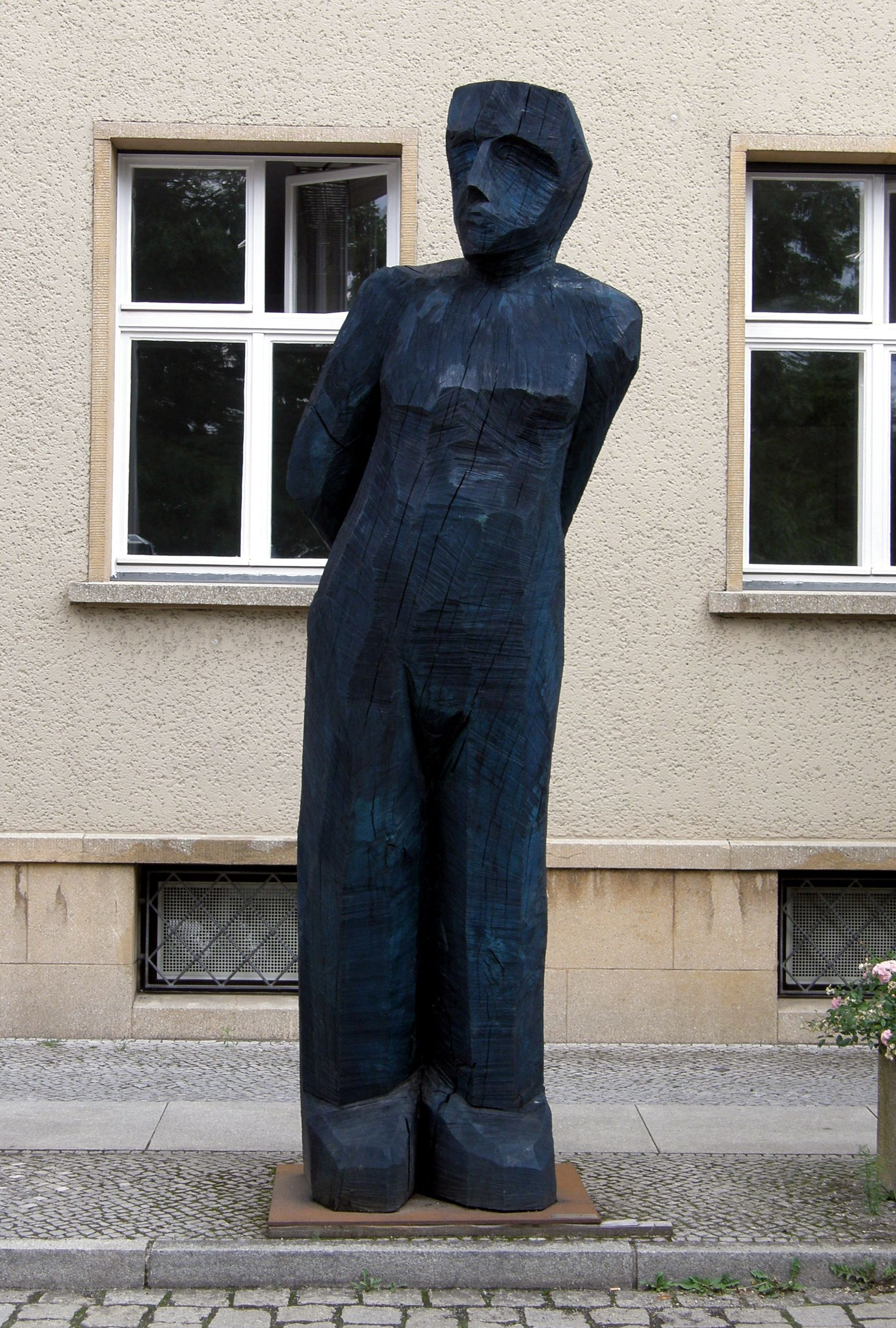 Josef Lang: Blauer Mann. 2005, Blau lasierte Eiche, Höhe 3,5m. Mecklenburgische Str. 57, Berlin-Wilmersdorf.